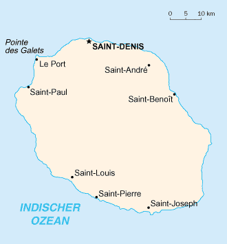 Karte Réunions